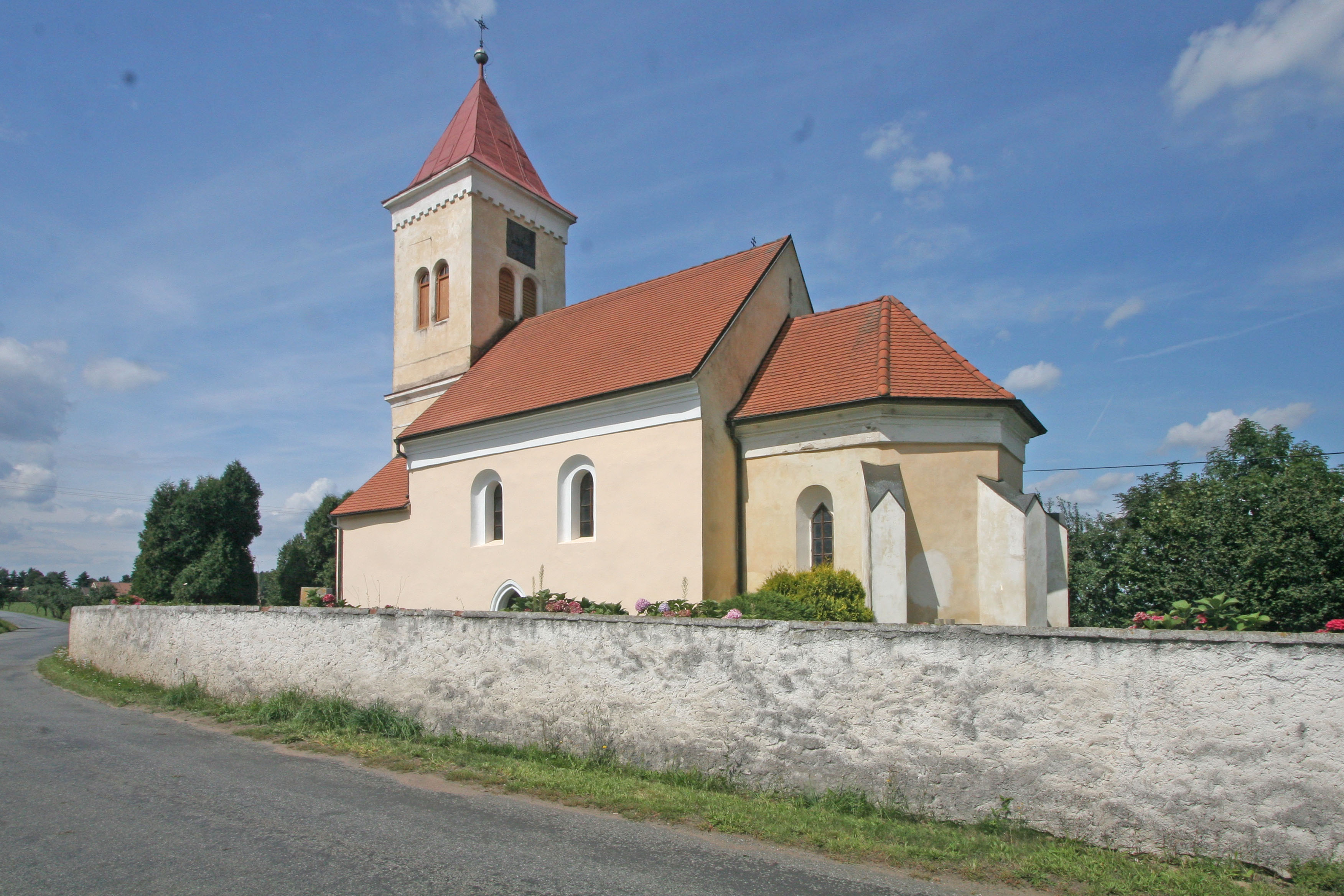 Kostel svatého Havla, jižní okraj vsi, Hošťalovice.